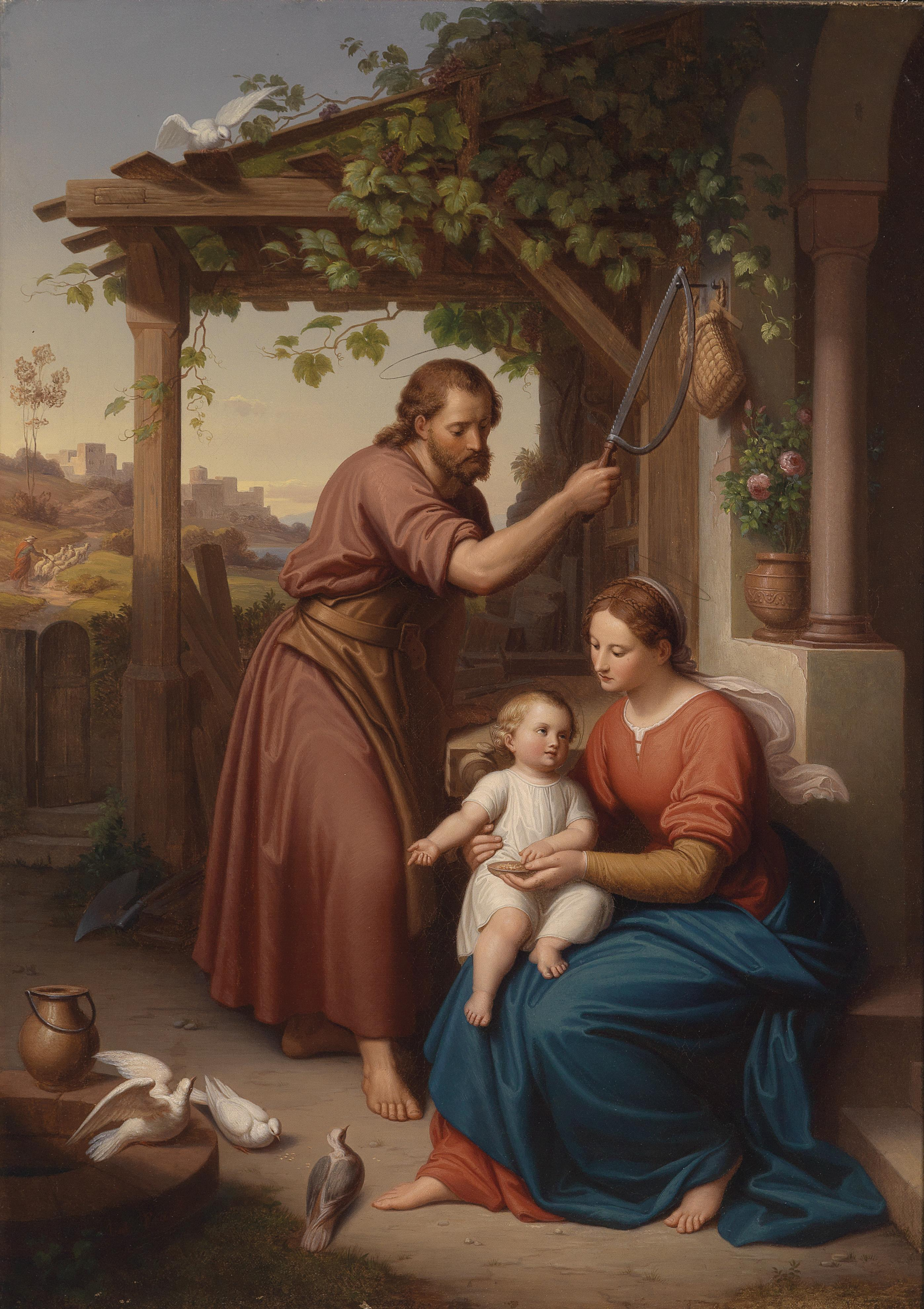 Maria und Josef mit dem Jesusknaben, undeutlich signiert jul. Frank, Öl auf Leinwand, 77 x 55 cm